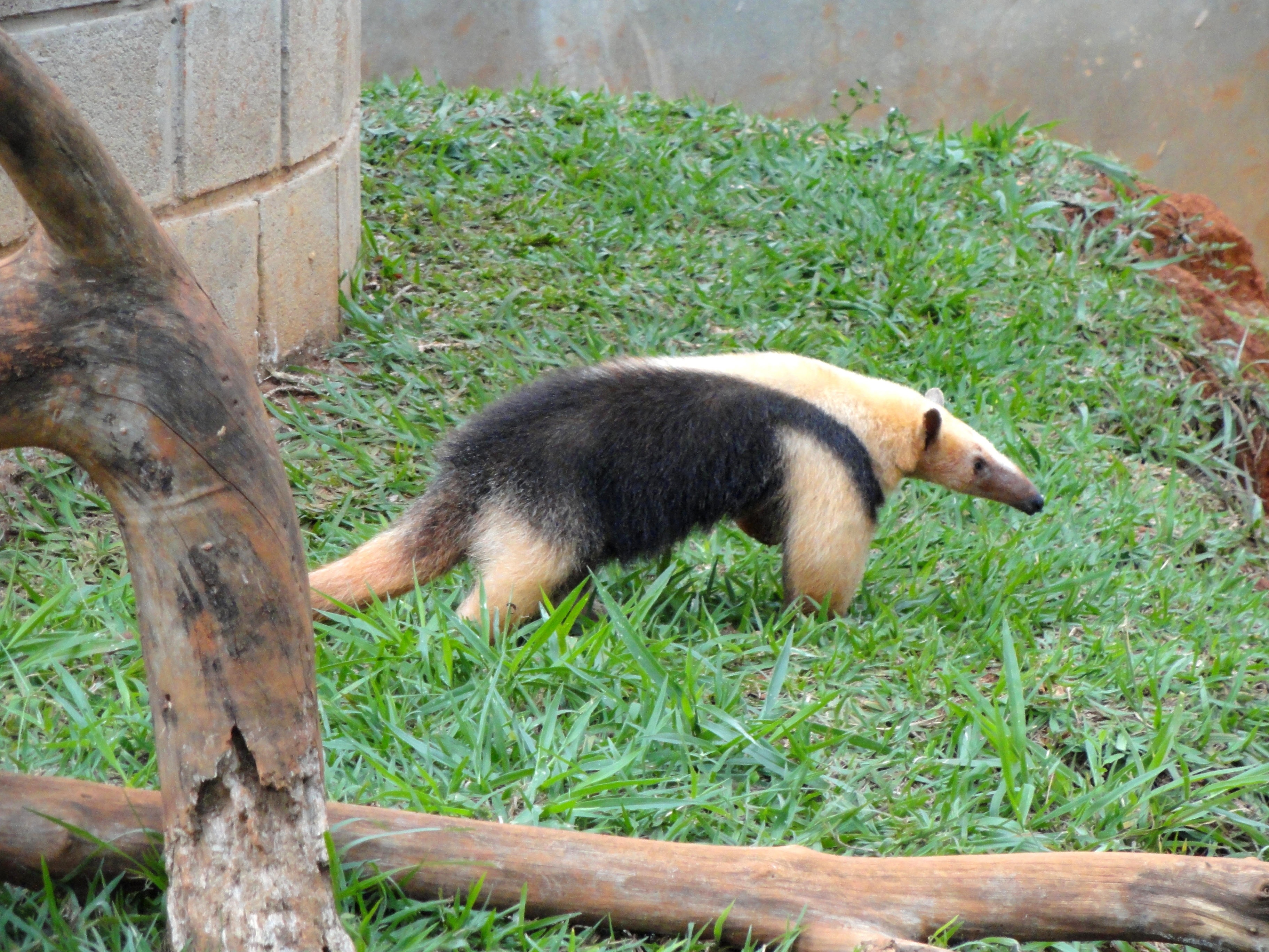 Jardim Zoológico de Brasília, Brasília, Brazil.